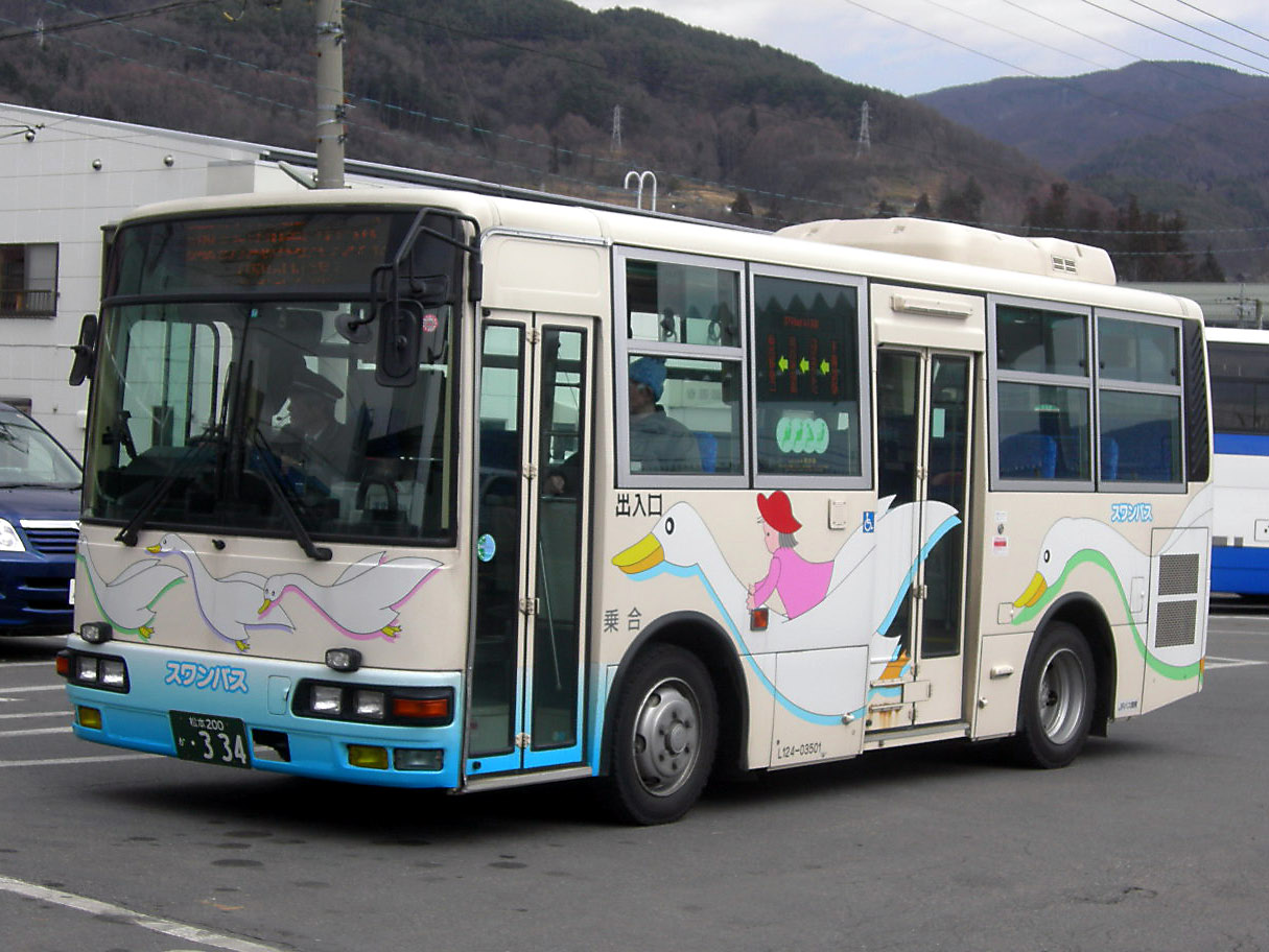 JRバス関東（JR bus kanto）三菱KK-MJ23HE中央道統括支店諏訪営業所所属（スワンバス専用車）